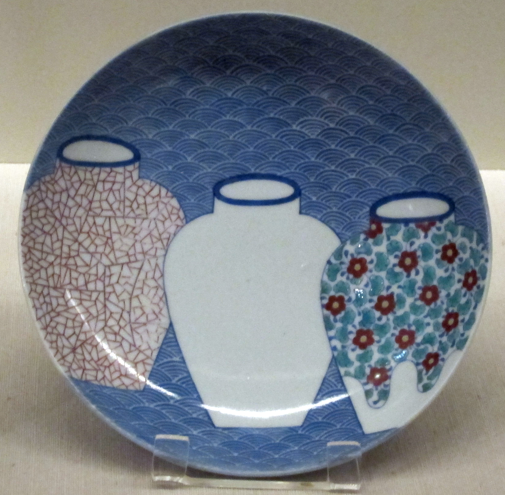 Manifatture di nabeshima, piatto decorato con vasi, 1690-1720 ca.